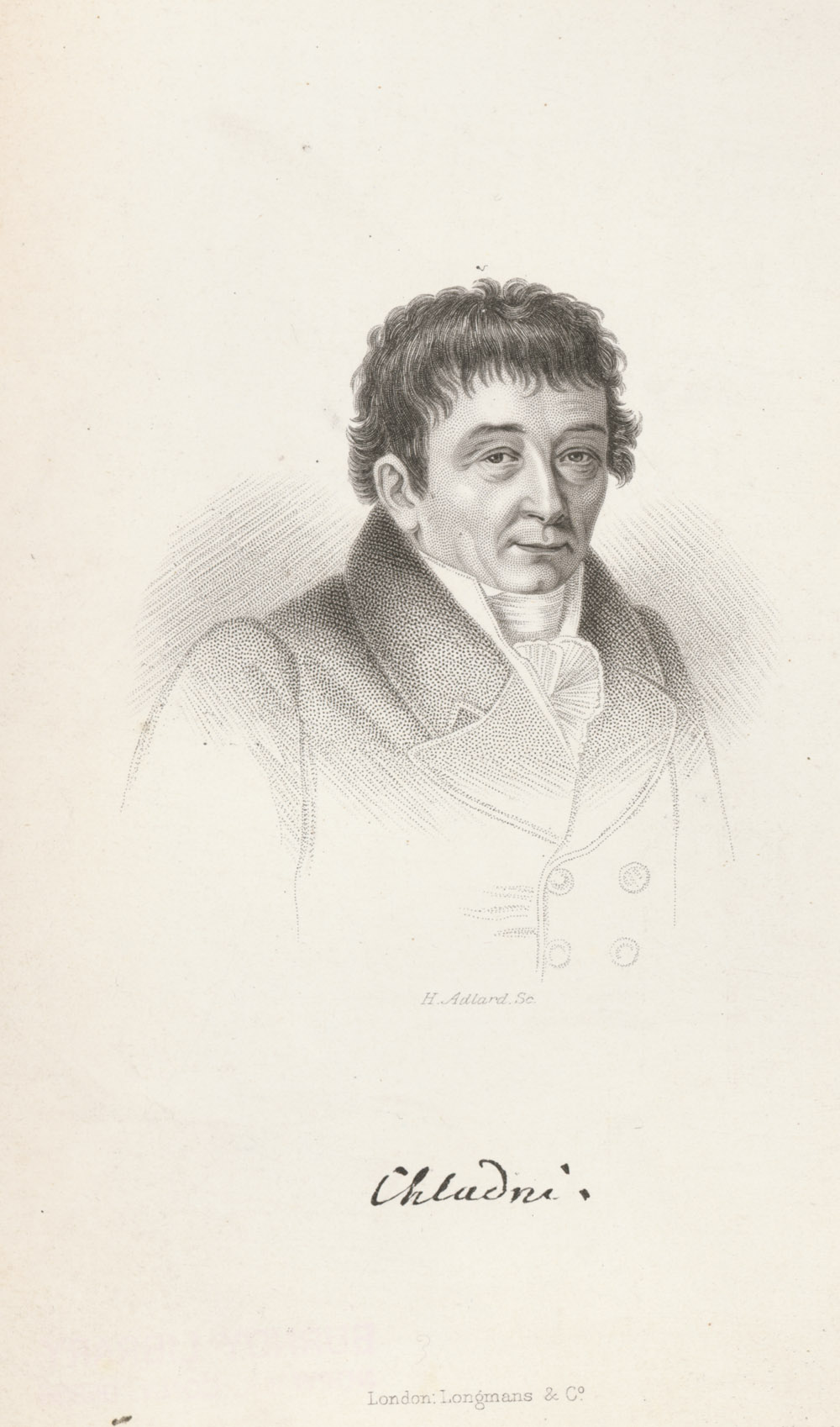 portret : E.F.F.Chladni